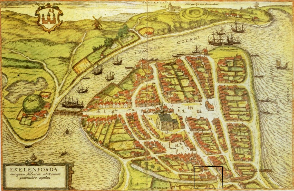 Eckernförde erster bekannter Stadtplan, eigener Scan aus Buchabbildung: mit Kenntlichmachung der Position der "Ritterburg"